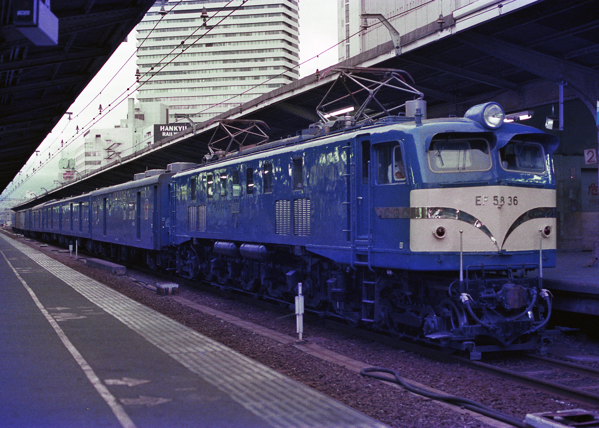 国鉄EF58 36けん引荷物列車